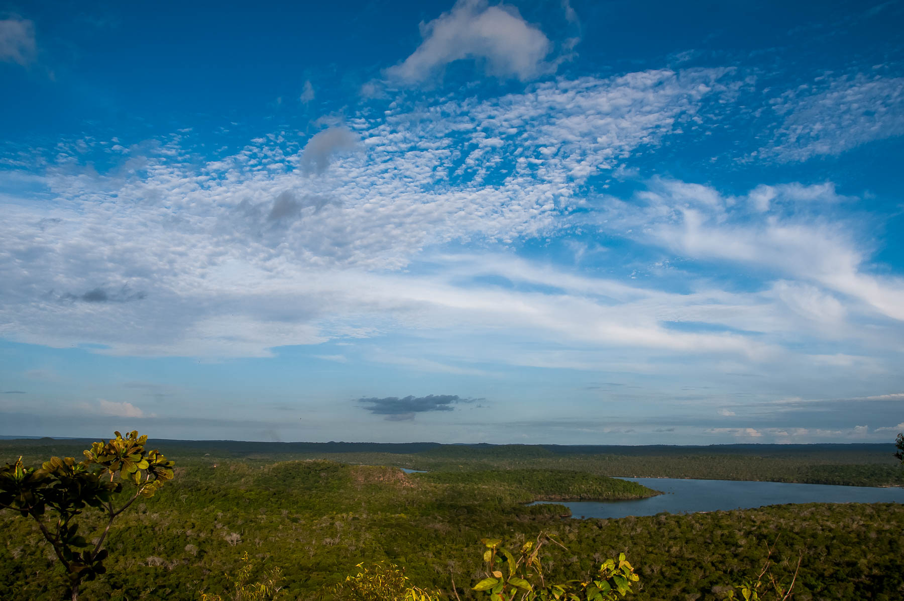 A Floresta Nacional do Tapajós é uma importante unidade de conservação da natureza localizada na Amazônia, mais precisamente às margens do Rio Tapajós, na região do estado do Pará. Criada em 1974, é a unidade de conservação federal na categoria de floresta nacional que mais abriga pesquisa científica no país – 65 pesquisas em 2013 (SISBIO, 2014). Com aproximadamente 527.000 hectares – mais de 160 quilômetros de praias – a unidade apresenta grande diversidade de paisagens: rios, lagos, alagados, terra firme, morros, planaltos, floresta, campos, açaizais, etc... A cobertura florestal fortemente preservada, o Rio Tapajós com suas águas verdes e mornas, e a enorme beleza cênica da região tornam Floresta Nacional do Tapajós uma das unidades de conservação mais visitadas na região norte do Brasil. Além das qualidades ambientais a Floresta Nacional do Tapajós também apresenta expressiva riqueza sociocultural, representada por aproximadamente 500 indígenas da Etnia Munduruku, divididos em três aldeias – Bragança, Marituba e Takuara. Essa riqueza cultural também é representada pelos mais de 5000 moradores tradicionais – populações ribeirinhas com hábitos culturais próprios – que vivem em 25 comunidades na região, desde antes da criação da unidade.